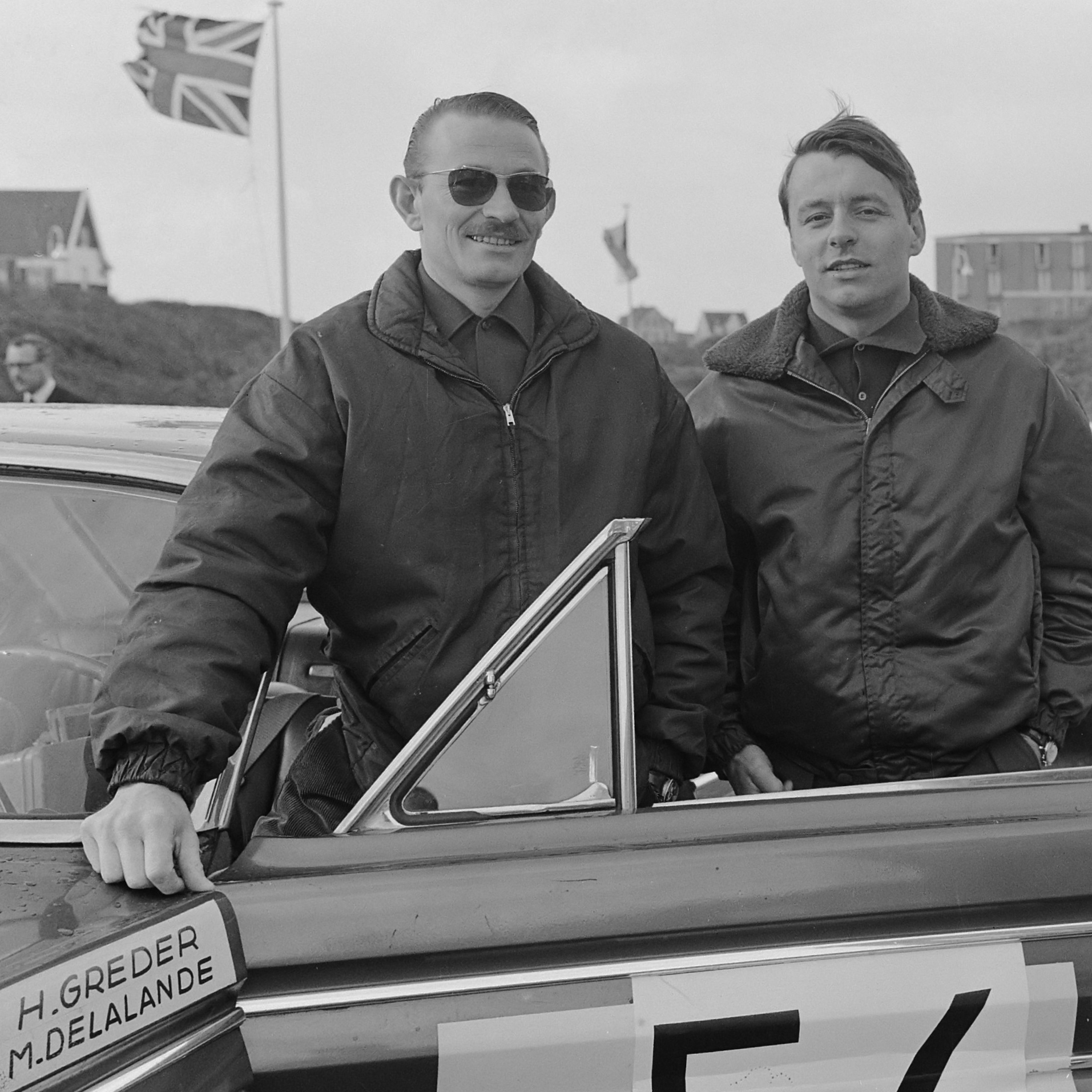 16e Tulpen Rally gestart in Noordwijk, de winnaars van vorig jaar Henri Greder en Marial Delalande 21 april 1964